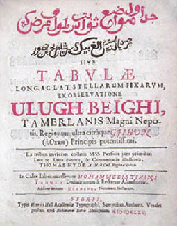 Sterntafel des Ulug Beg. Ausgabe von Thomas Hyde 1665